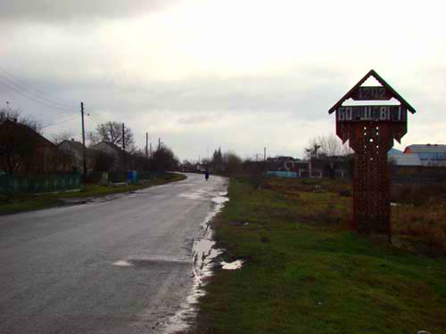 Борщовичі: Вигляд села Борщовичі